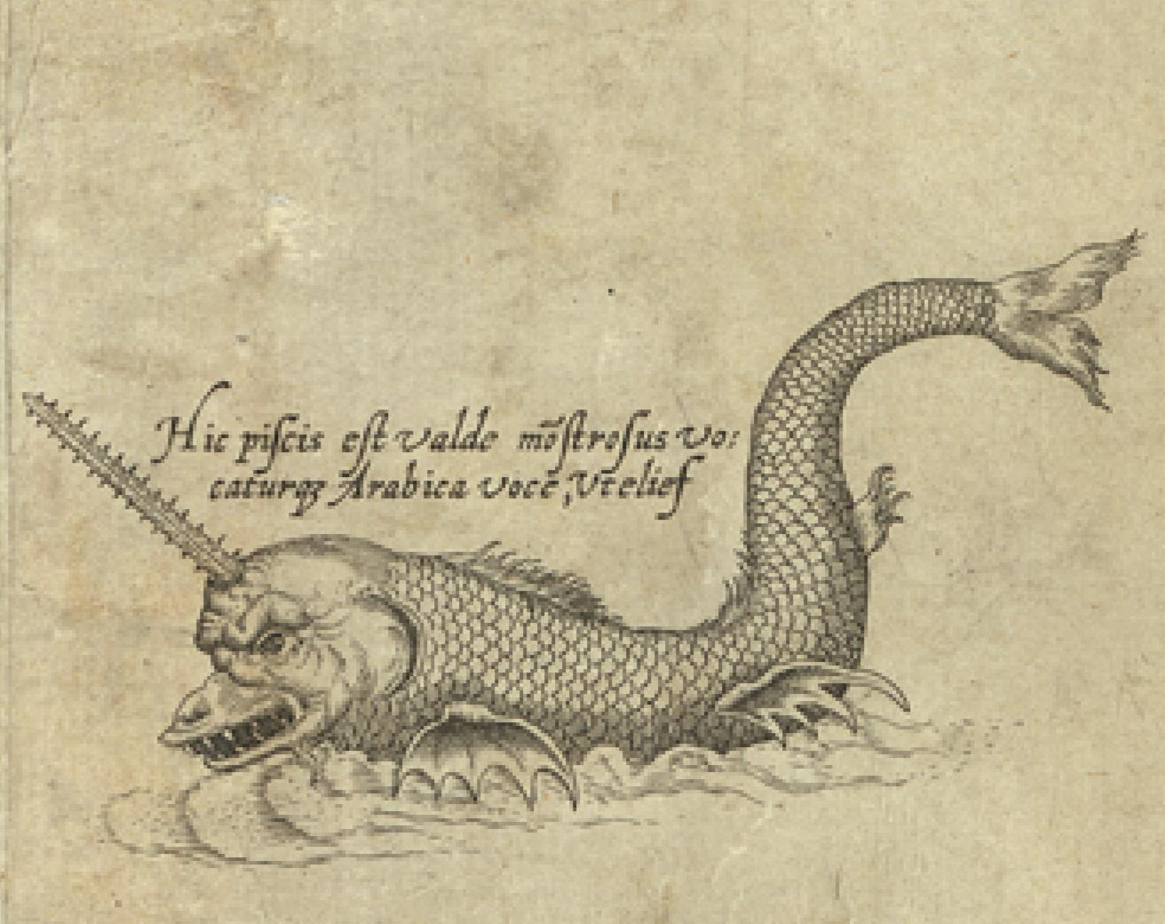 Daniel Keller. Asiae nova descriptio (Antwerpen, 1590)